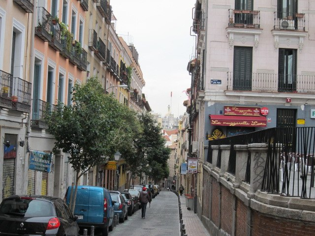 Malasaña